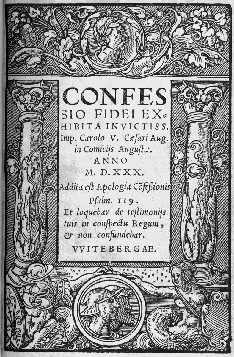 Erstausgabe der Augsburger Konfession mit Vorstücken und Anhang in lateinischer Sprache, Confessio fidei exhibita invictiss. Imp. Carolo V. Cesari Aug. in Comicijs Augusta. Anno M.D.XXX. Addita est Apologia Confeßionis, Rhau, Wittenberg 1531